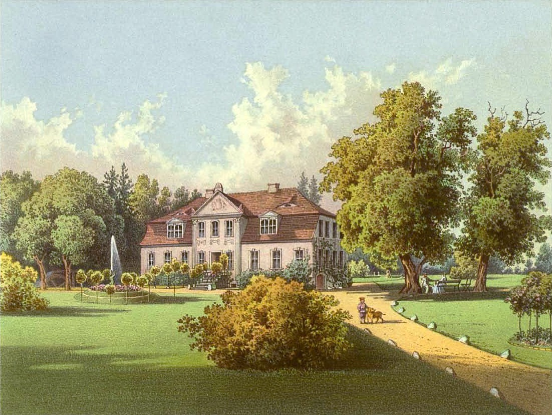 Schloss Raakow (Raackow), Kreis Calau